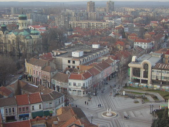 Center Street in Vidin, Bulgaria